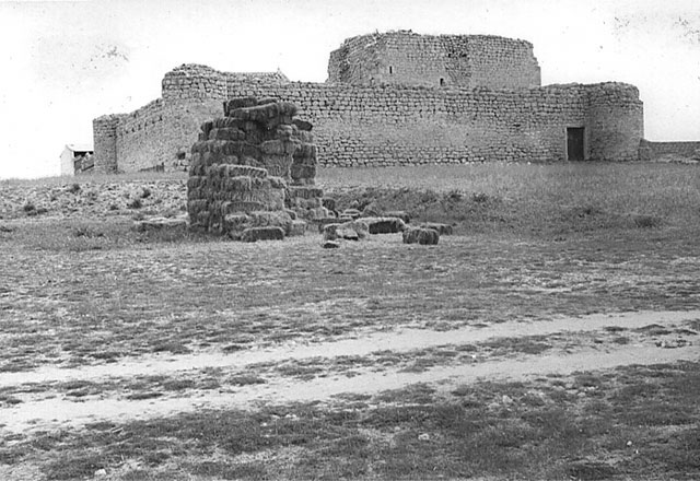 Castillo - Fuente el Sol (Valladolid) - Fotografía. Papel 124 x 84 B/N